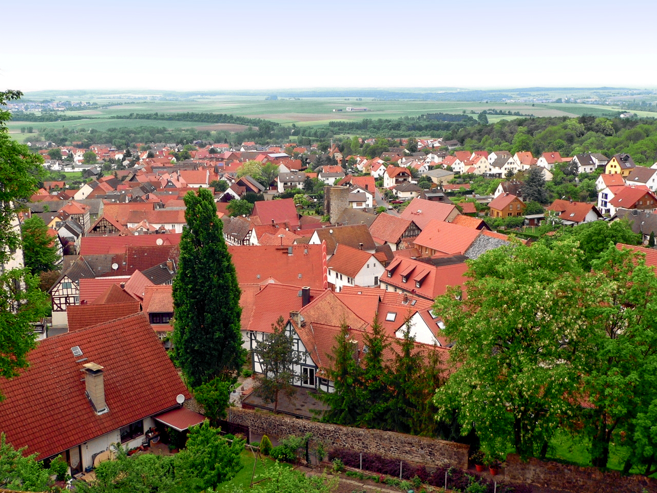 Ortsansicht von Münzenberg, Hessen, Germany